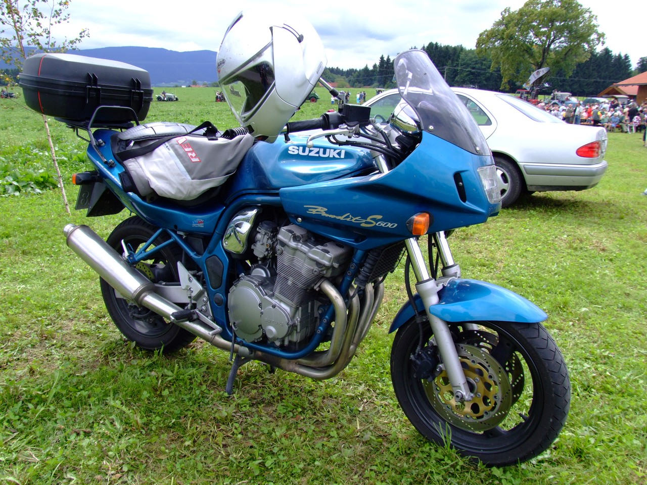 Quelle: selbst fotografiert, 08/2006 Fotograf: Späth Chr.